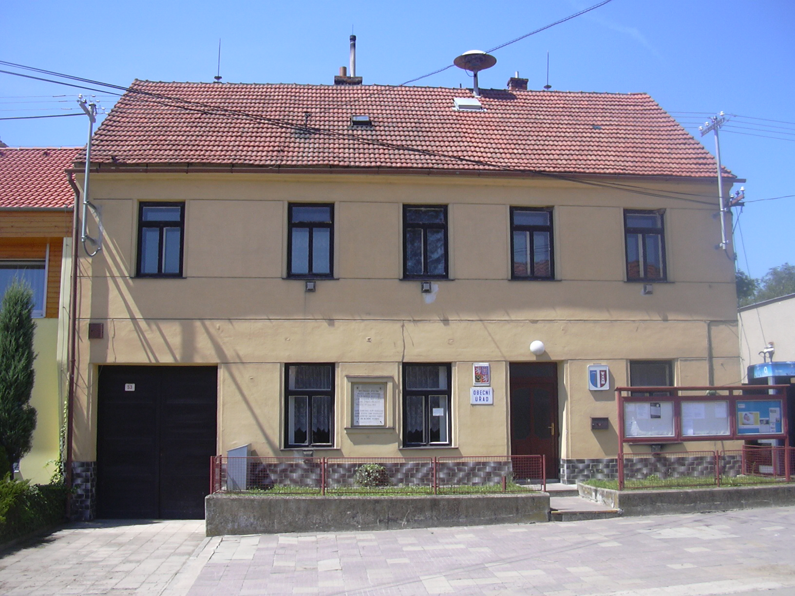 Komořany - obecní úřad(Vyškov- Czech republic)